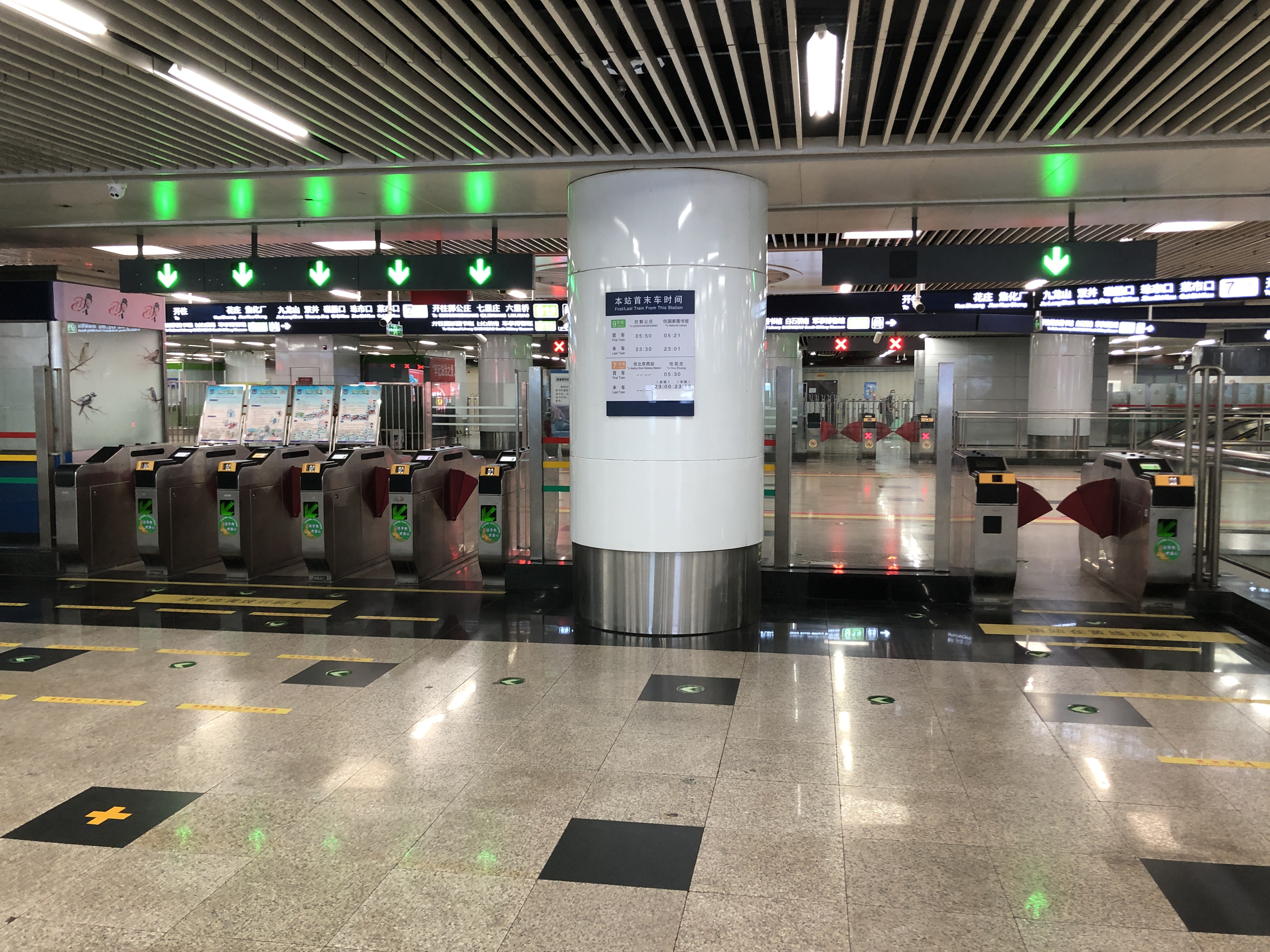 中文（中国大陆）: 北京地铁北京西站西进站口